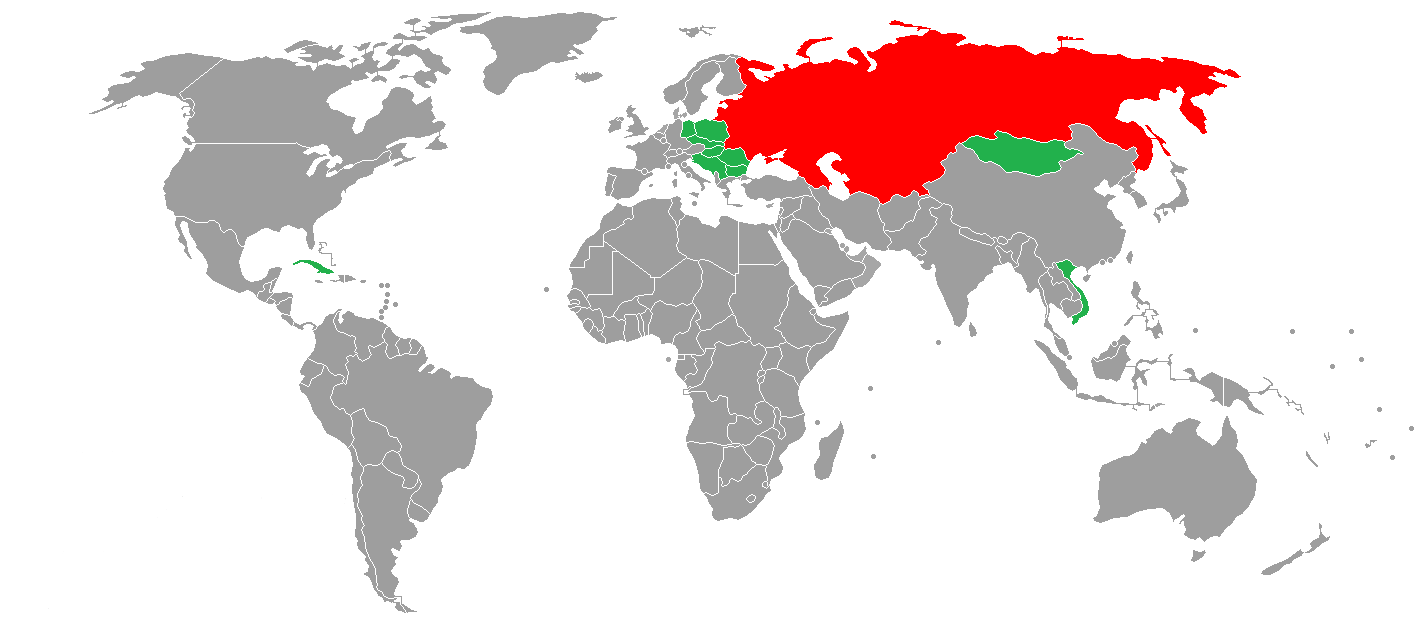 Visa policy of the USSR in 1984